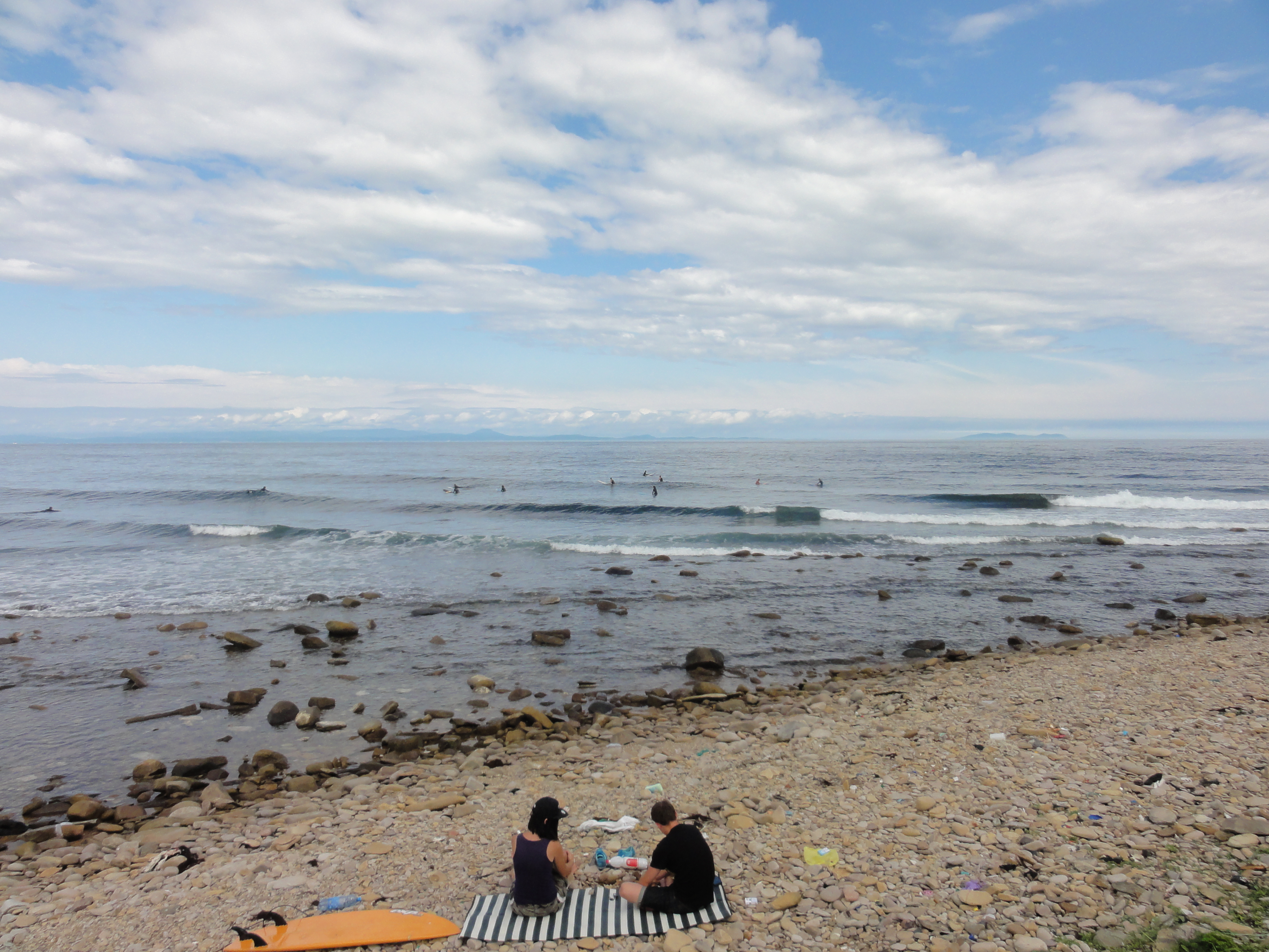 Уссурийский залив в самой широкой части. На переднем плане восточный берег острова Русский. Вдали справа - остров Аскольд